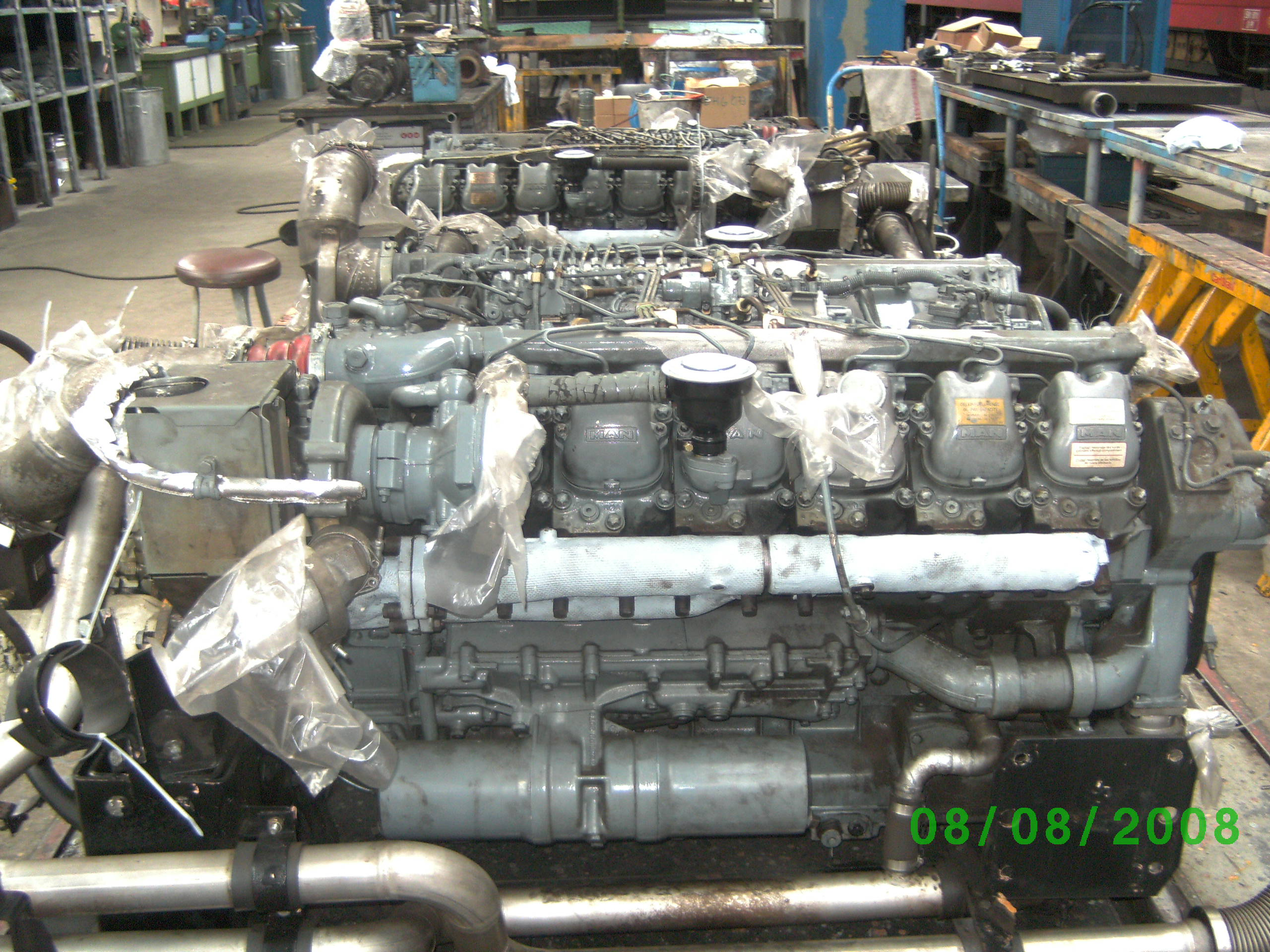 Ausgebauter Fahrmotor des IFO 711 118